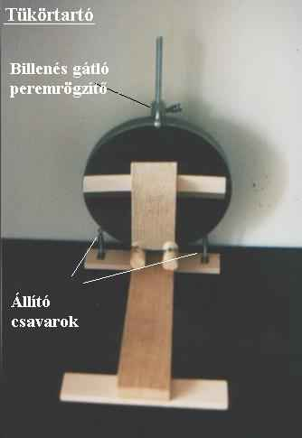 Sötétszürke (vagy fekete) padlón, világosszürke háttér előtt lécekből kialakított tükörtartó, rajta egy távcsőtükör, rögzítőcsavarokkal.